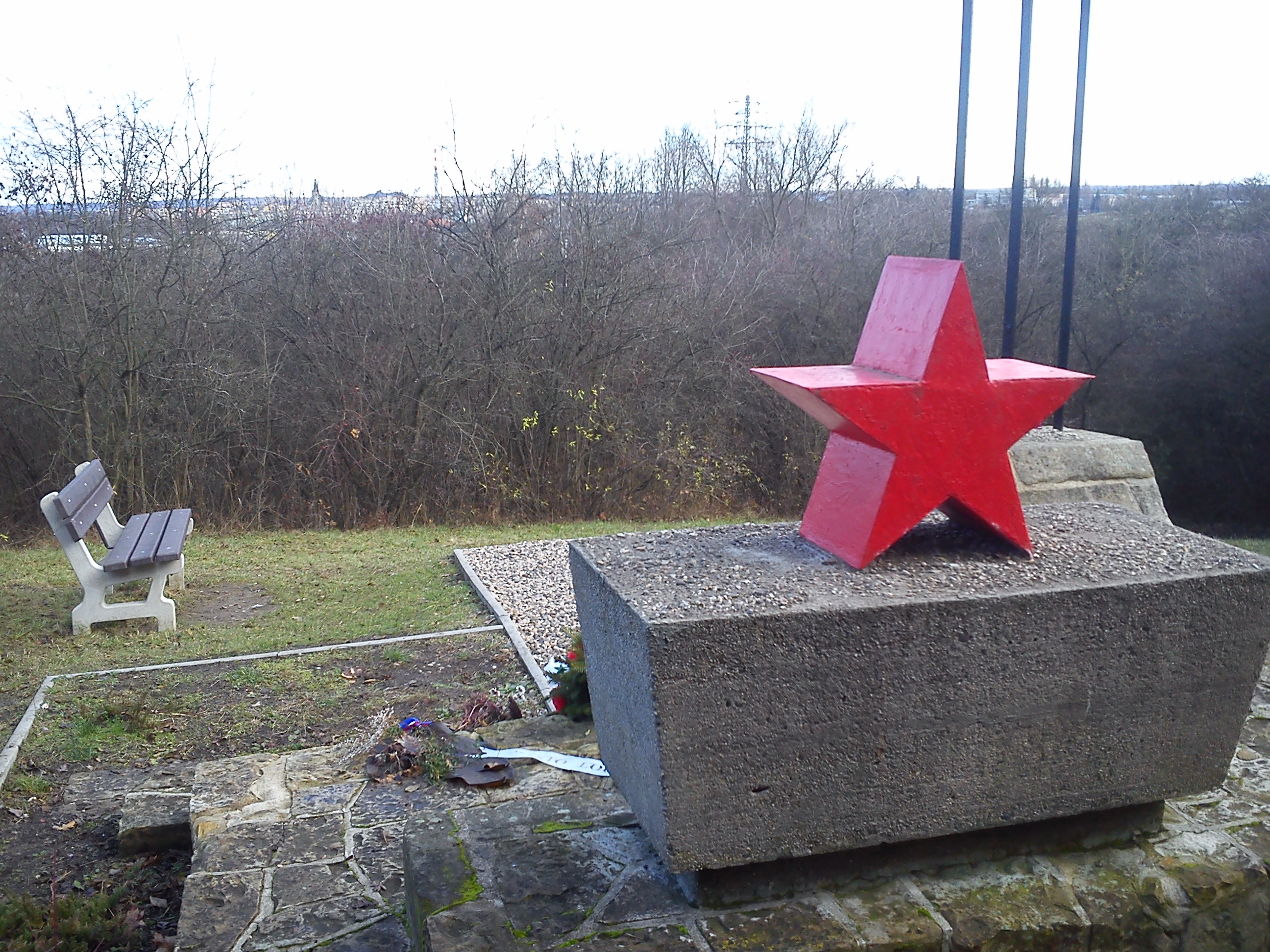 památník pohledem zezadu ze západu, dominantní rudá hvězda a lavička před památníkem (v pozadí výhled na město Louny a kostel svatého Mikuláše)